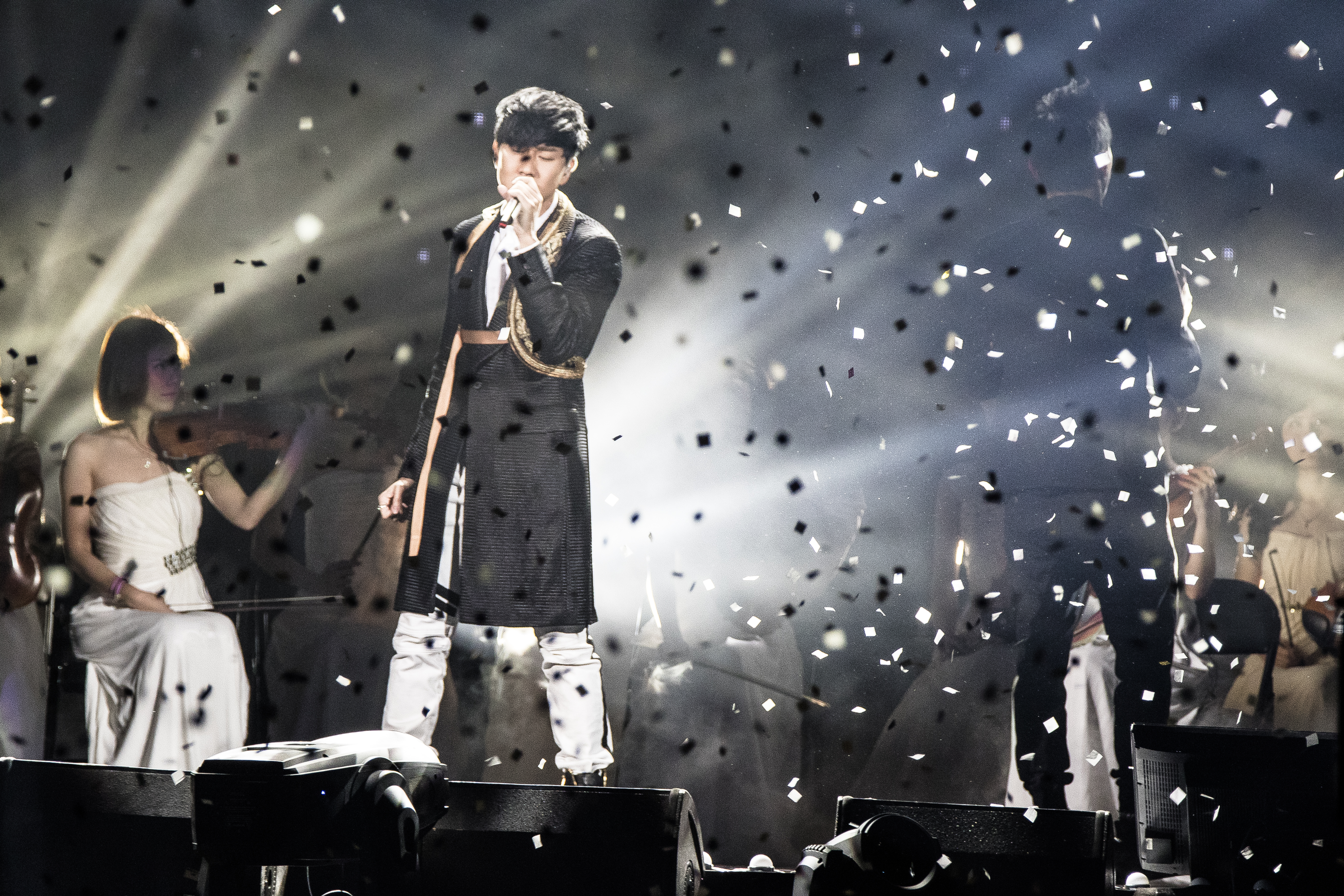 中文（台灣）: 林俊傑出席第十屆KKBOX風雲榜。